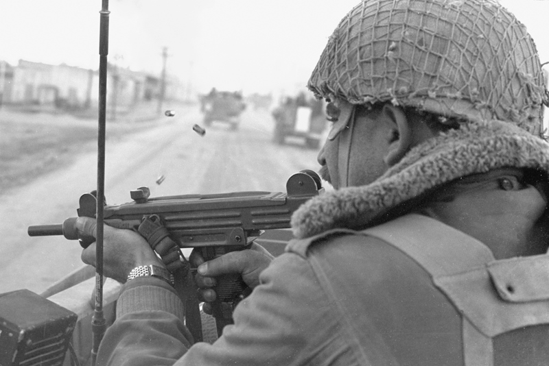 פעולת "כראמה", מבצע "תופת". כח צנחנים מחטיבה 35 ושריון מחטיבה 7 בפריצה לעיירה. מוליכים טנקי סנטוריון מחטיבה 7, יתכן מפלוגתו של אברהם ברעם.